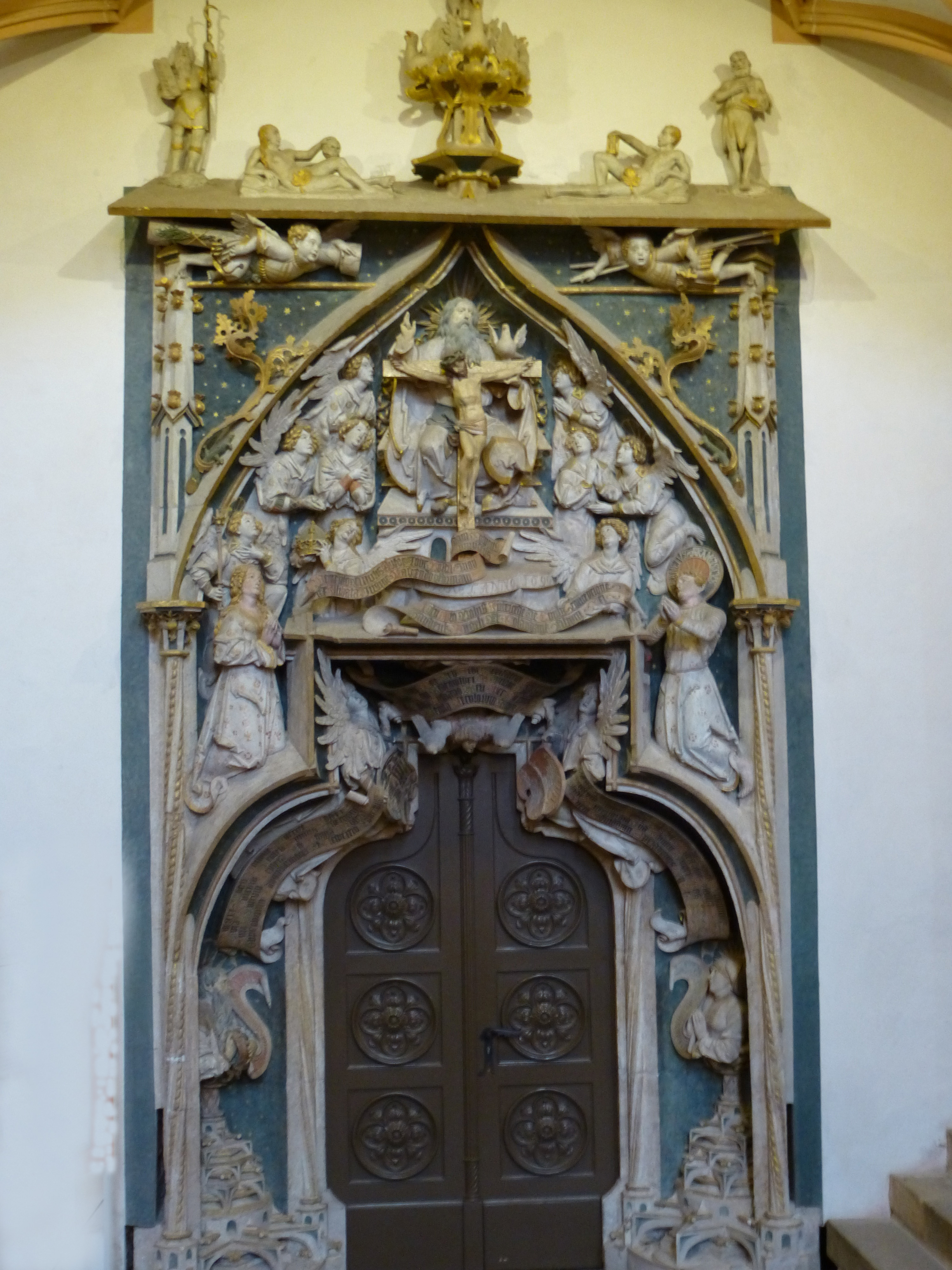 Provenant d'une autre église, réalisée par H Witten en 1512